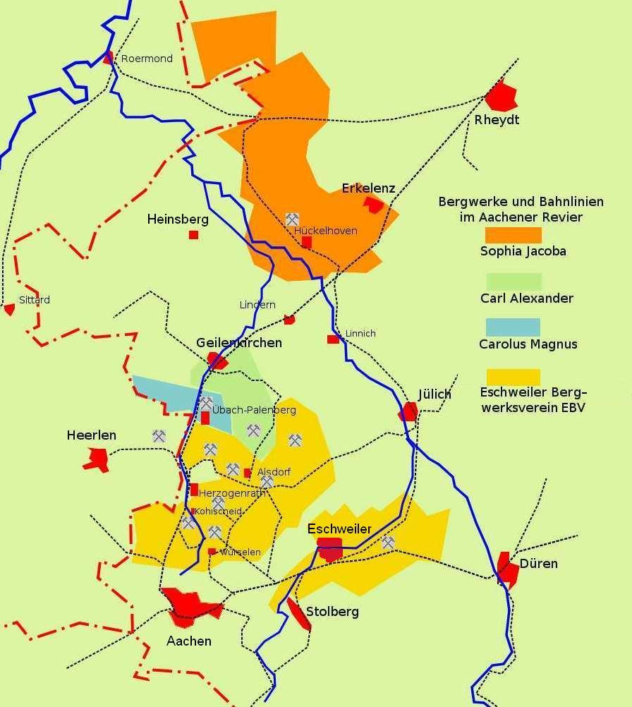 Karte des Steinkohlenreviers Aachen